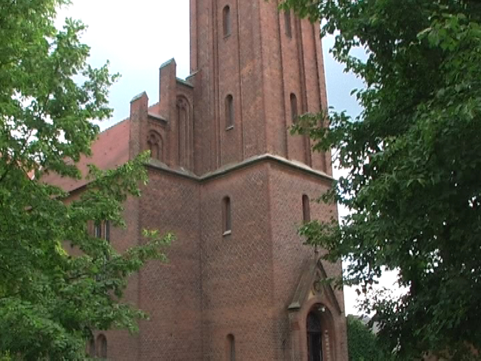 cyrkej, Nowa Niwa